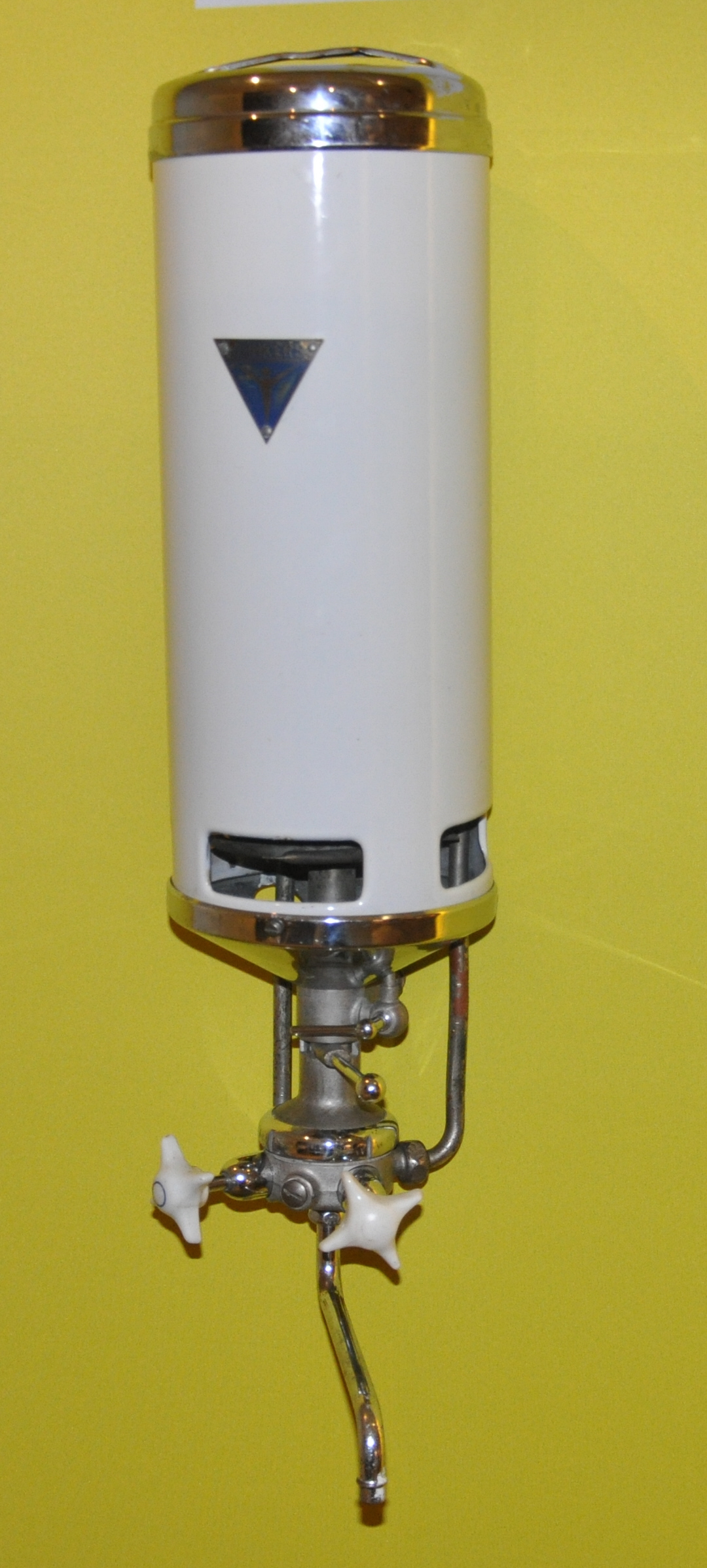 Gasbetriebener Durchlauferhitzer der Fa. Hugo Junkers Ausstellung StadtGasLicht 1862–2012 im Museum Humpis-Quartier Ravensburg